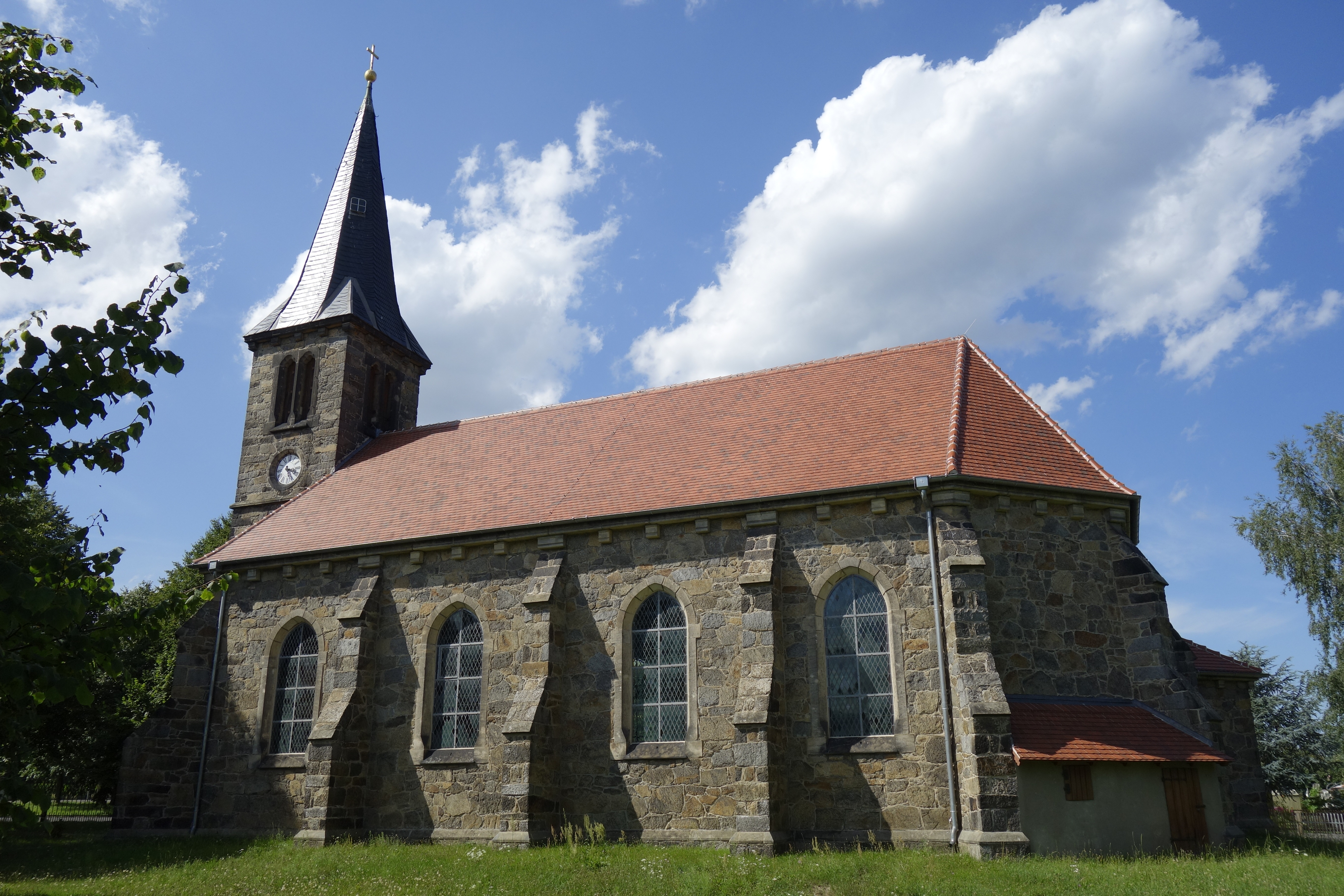 Kirche Luppa Juli 2017 (1) Hornjoserbsce: Ewangelska cyrkej we Łupoji